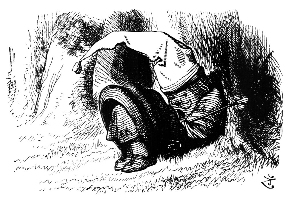 гравюра Джона Тенниела